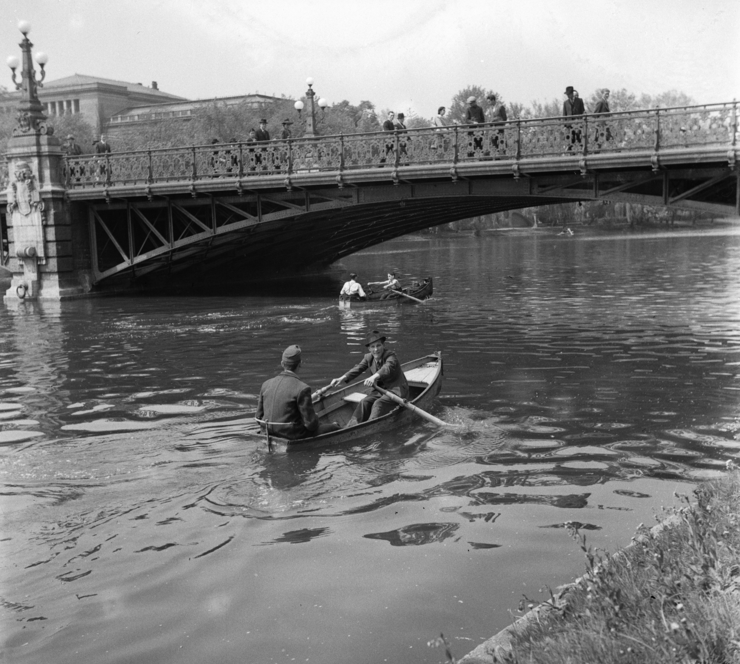 csónakázótó. Location: Hungary, Budapest XIV. Tags: boating, bridge, Budapest Title: csónakázótó.